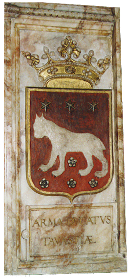 Tavastlands landskaps vapen vid Gustav vasas grav